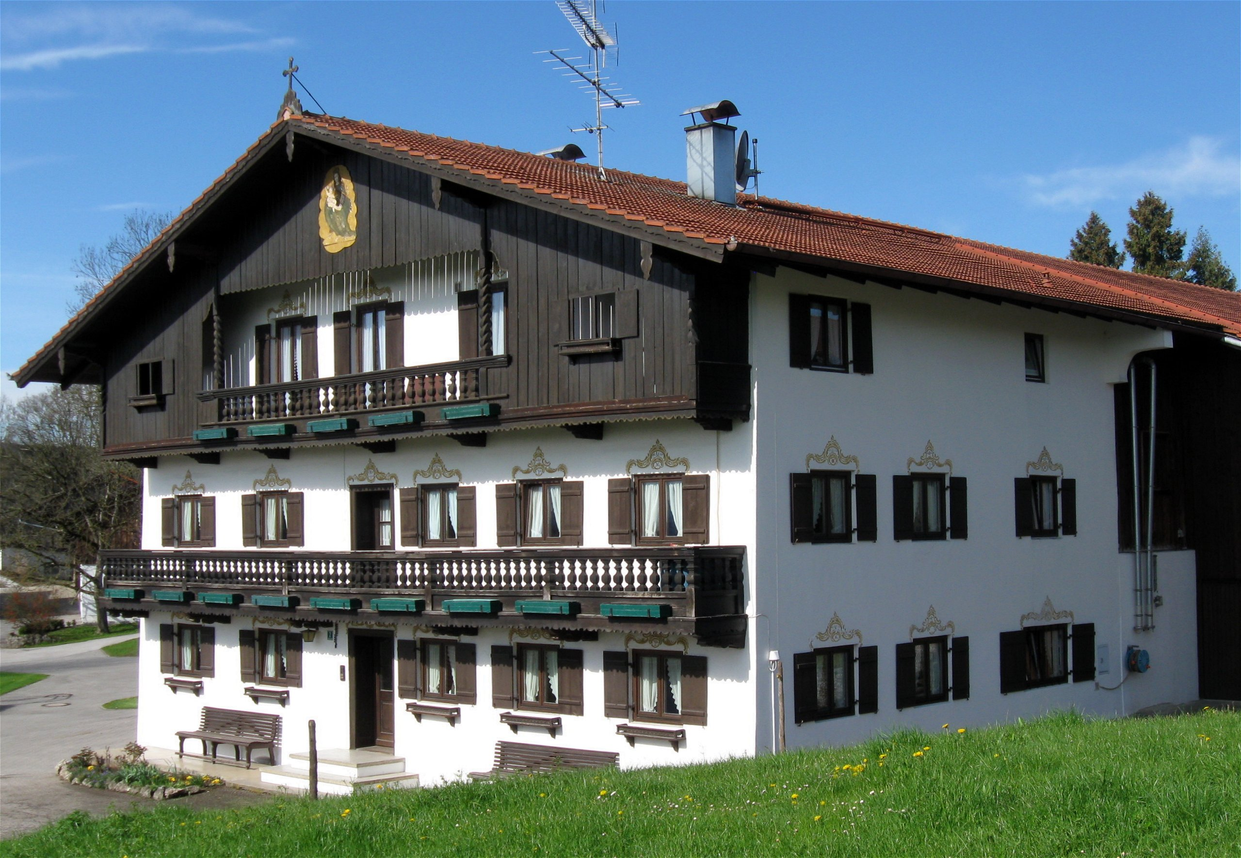 Römerring 2; Gottvater-Relief, wohl 18. Jh.; D-1-87-129-44ldach, Laube, Nische mit Laube an der Ostseite, Wirtschaftsteil mit Bundwerk an der Ostseite, Firstbalken bez. 1852, Erdgeschoss wohl älter. D-1-87-129-48